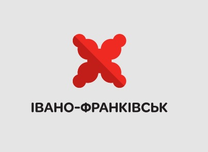 Логотип Івано-Франківська